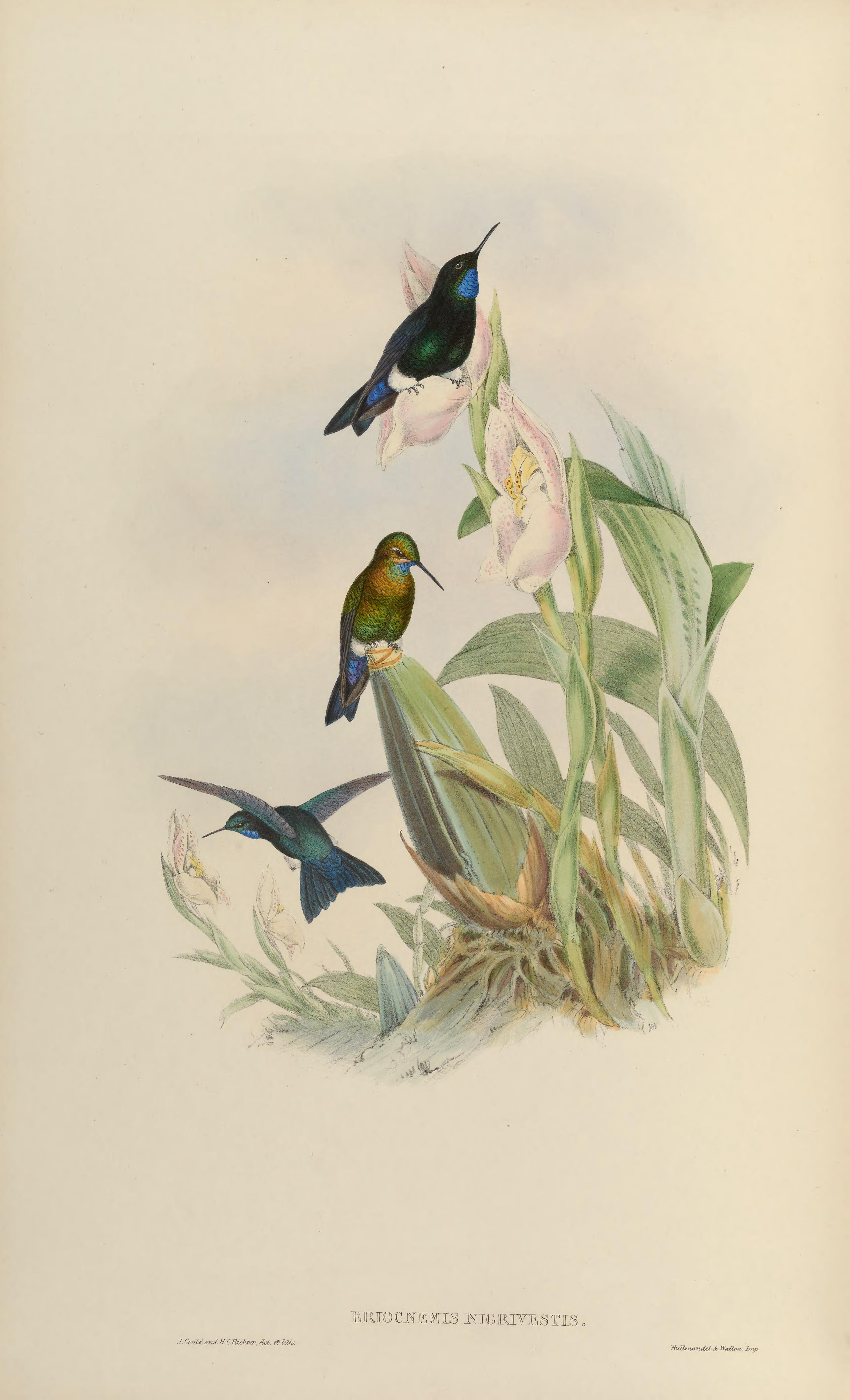 Eriocnemis nigrivestis [1]